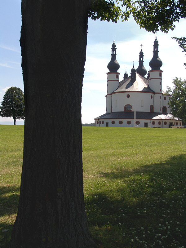 Kappl nach der jüngsten Restaurierung, die 2004 abgeschlossen wurde. Fotograf: Walter J. Pilsak, Waldsassen Copyright Status: GNU Freie Dokumentationslizenz